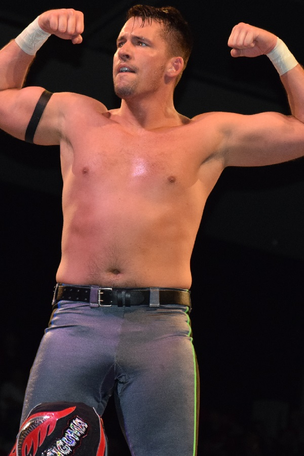 2018年3月11日 ベイコム総合体育館 「NEW JAPAN CUP 2018」 チャッキーT